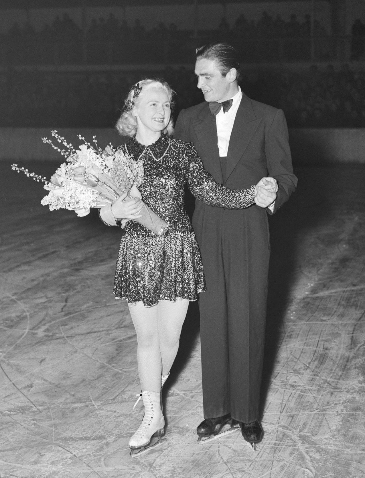 Collectie / Archief : Fotocollectie Anefo Reportage / Serie : [ onbekend ] Beschrijving : Kunstrijderspaar Pausin in Apollohal Datum : 16 februari 1950 Instellingsnaam : Apollohal Fotograaf : Vermorken, […] / Anefo Auteursrechthebbende : Nationaal Archief Materiaalsoort : Negatief (zwart/wit) Nummer archiefinventaris : bekijk toegang 2.24.01.04 Bestanddeelnummer : 903-8289